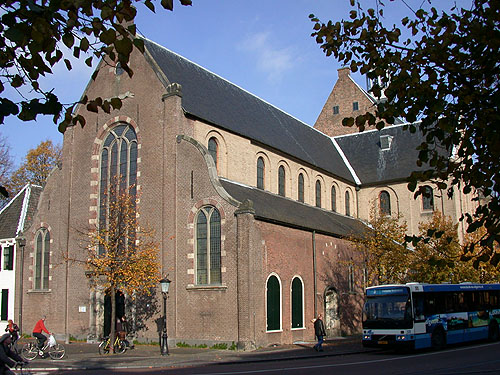 Janskerk Utrecht, eigen foto